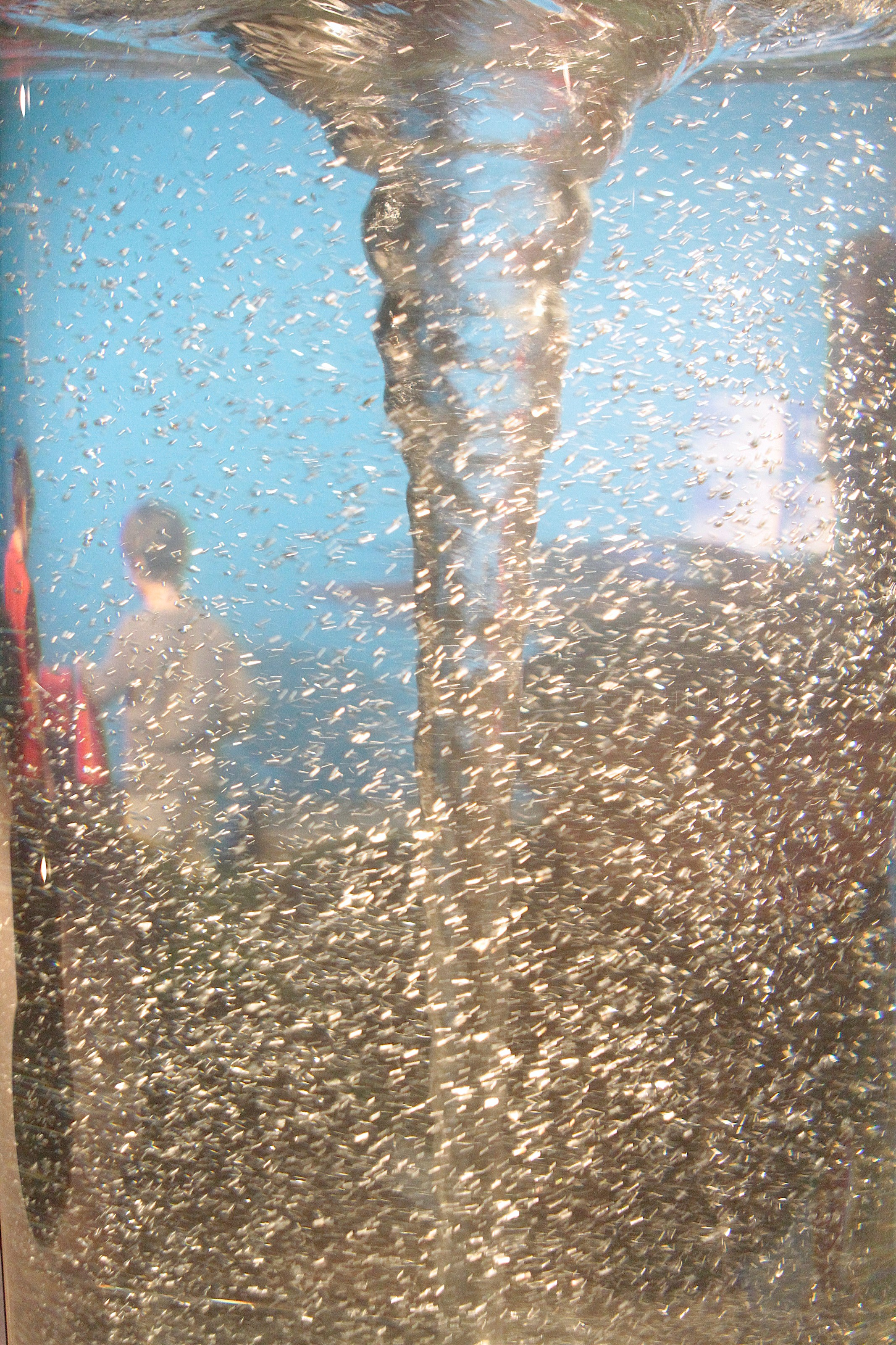 Uno degli "exhibit hands-on" dell'Immaginario Scientifico